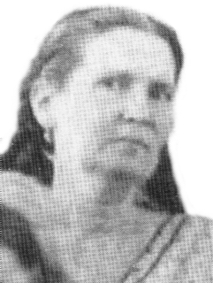 Tomasa Carbo y Noboa (de Noboa), esposa del presidente ecuatoriano Diego Noboa y Arteta, y por tanto Primera Dama de ese país.